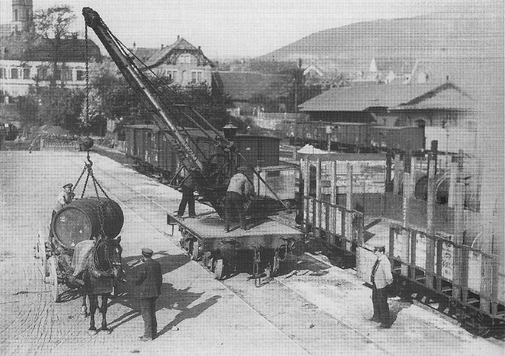 Fassverladung im Bf. Bad Dürkheim um 1905